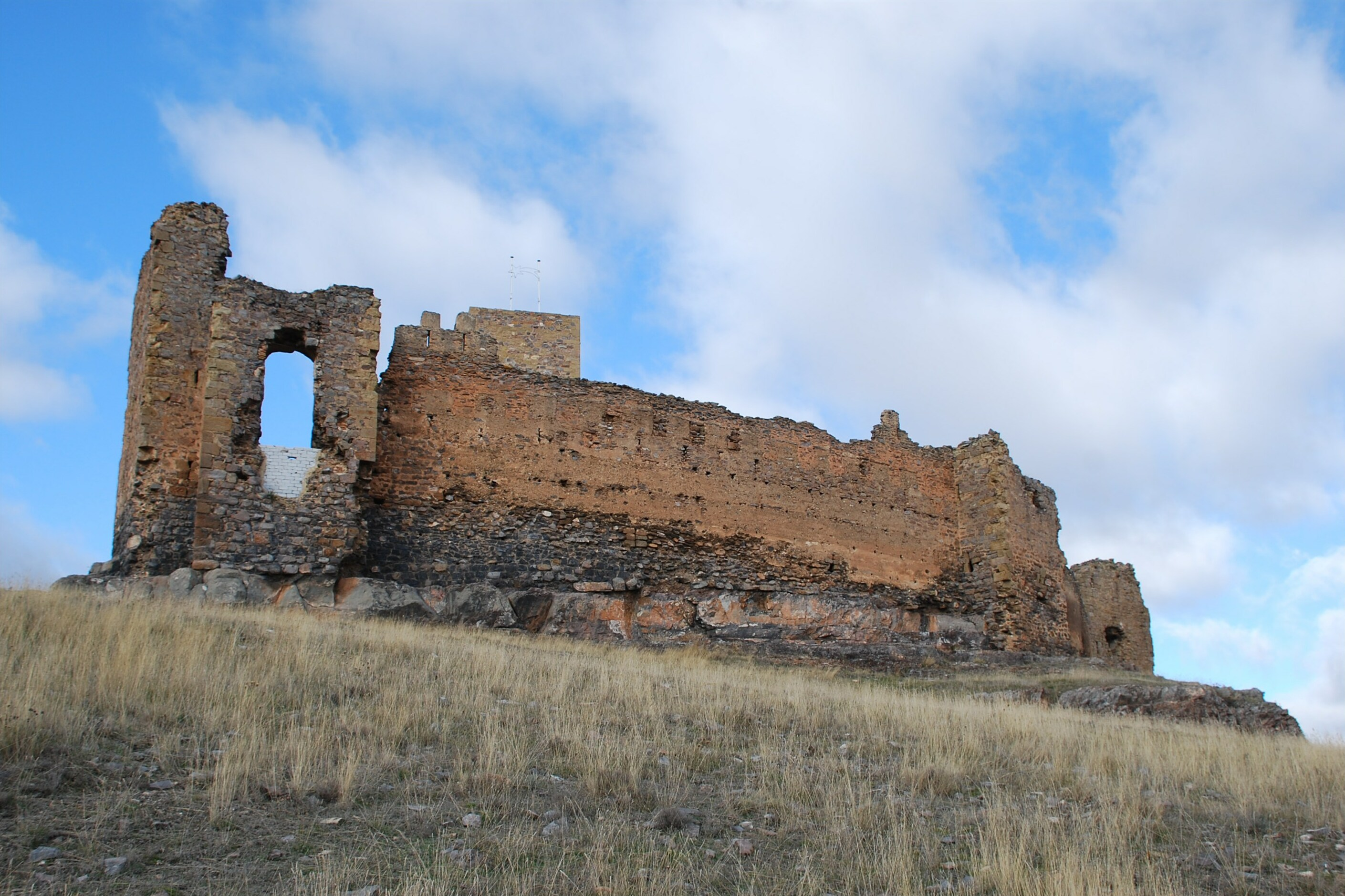 Castillo de Trasmoz, provincia de Zaragoza (España)